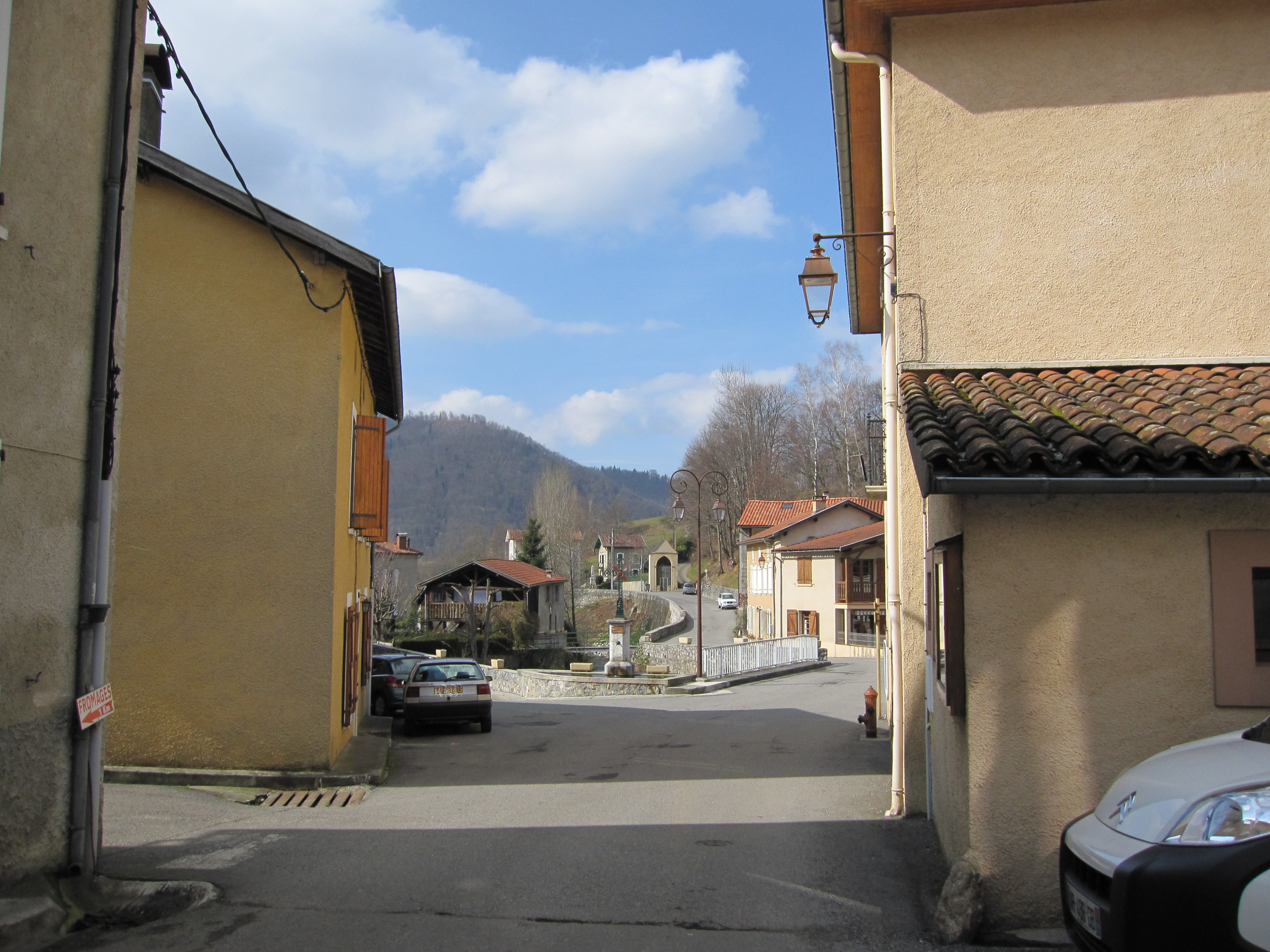 centre du village de Milhas